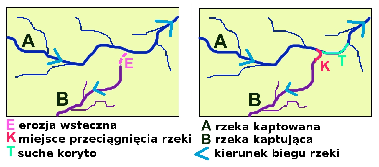 przechwycenie przez jedną rzekę wód innej rzeki w wyniku bardzo silnego działania erozji wstecznej